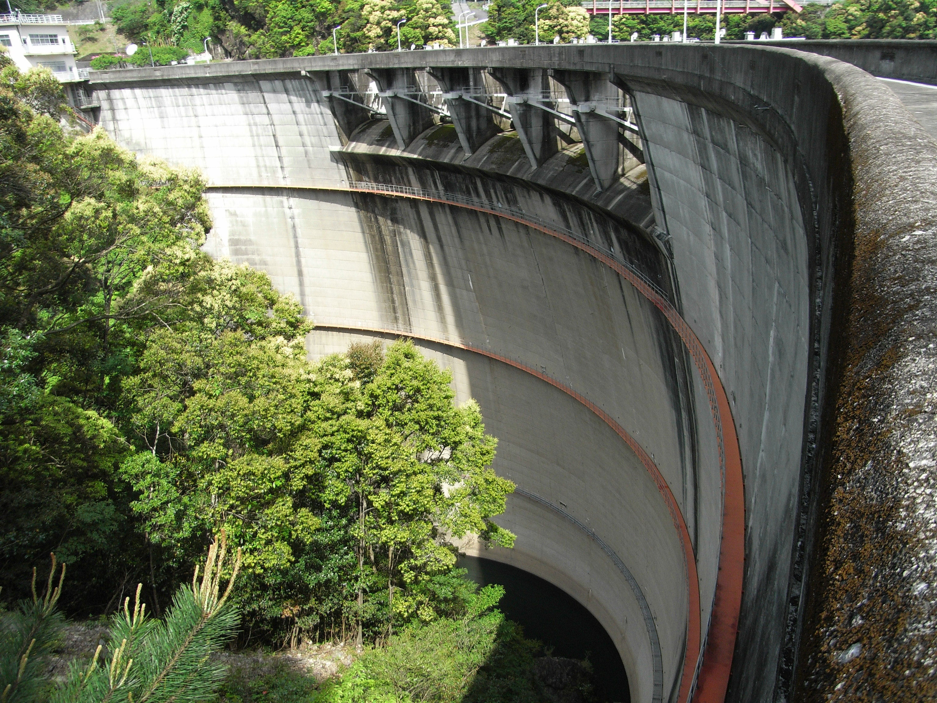 Dam